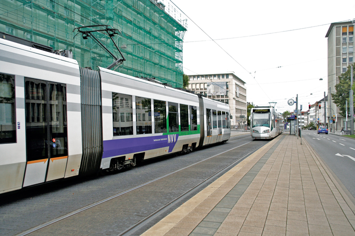 Zwei Züge der RegioTram am Scheidemannplatz